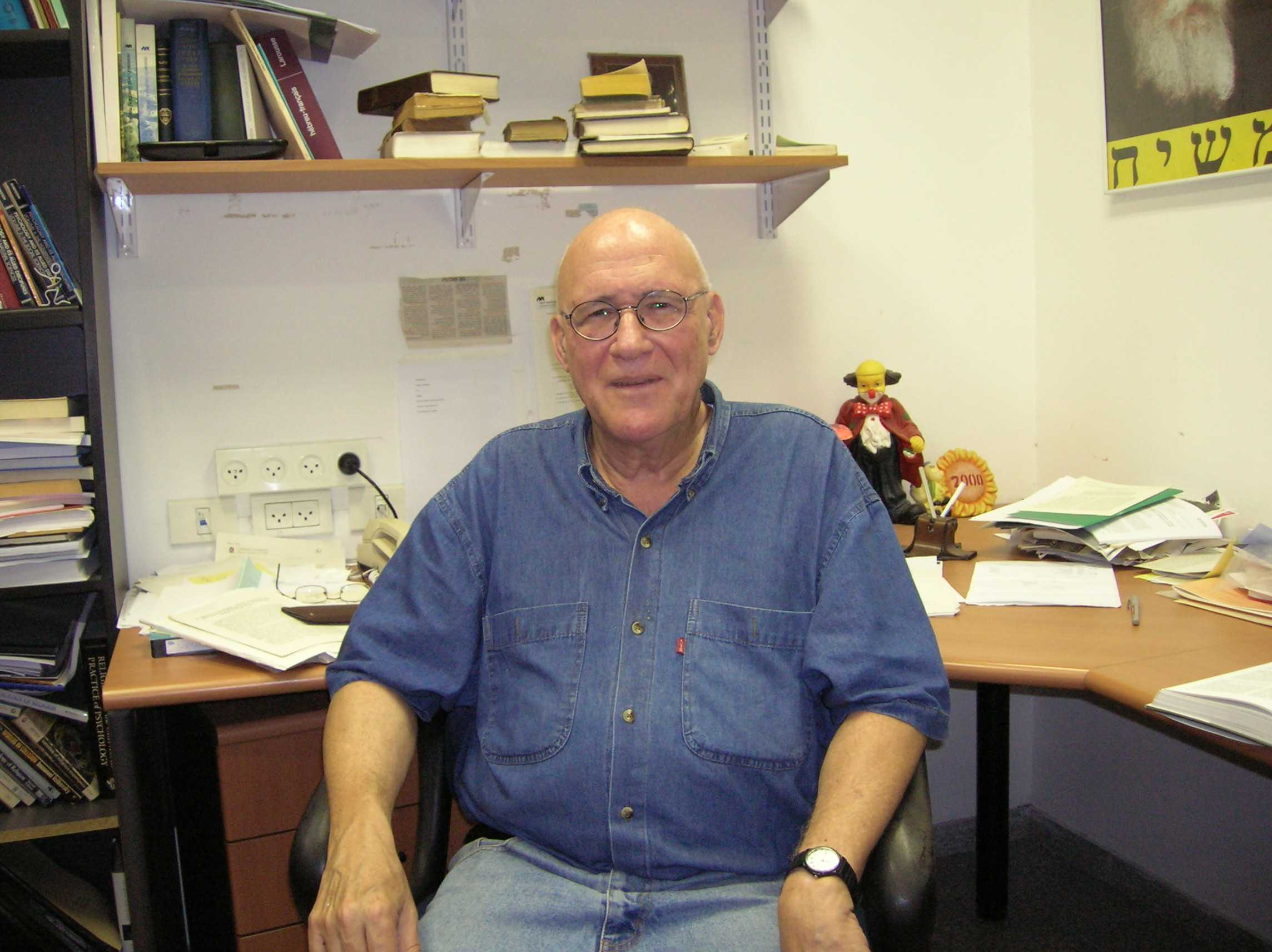 Professor_Benny_Beit-Hallahmi